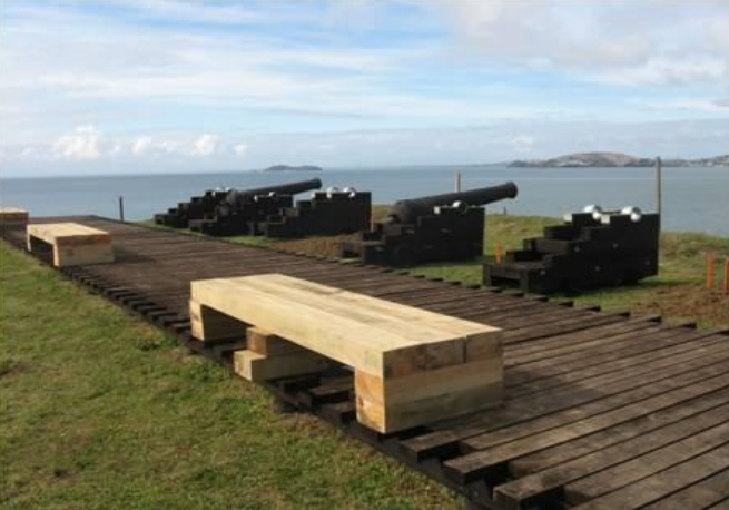 Batería Balcacura, año 2010.